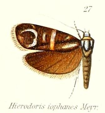 Hierodoris iophanes